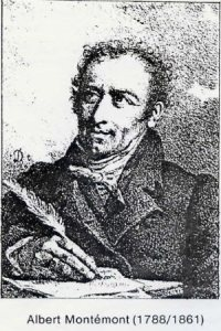 portrait d'Albert Montémont